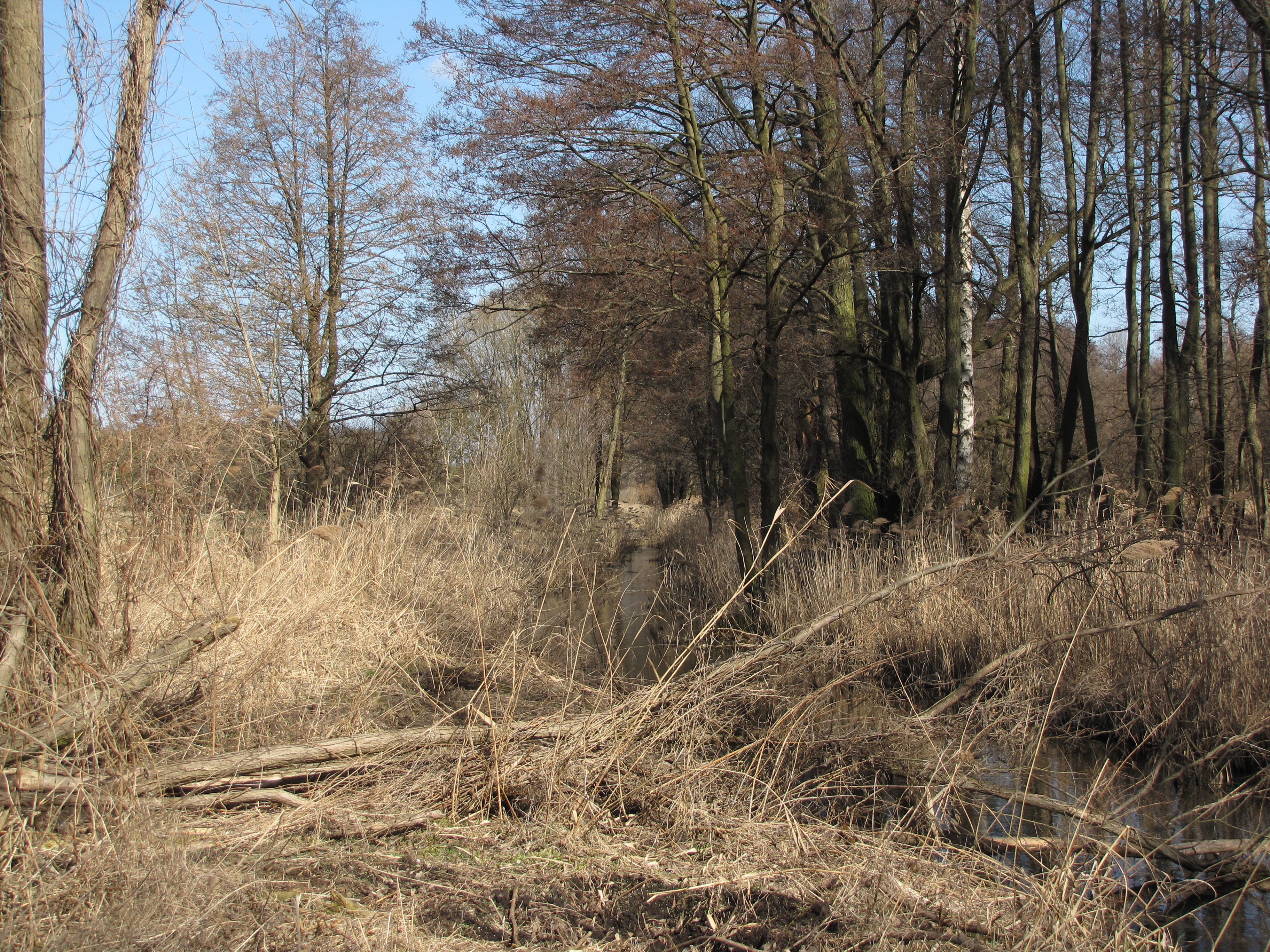 Zülowgraben nordöstlich des Südringcenters, Rangsdorf, Brandenburg